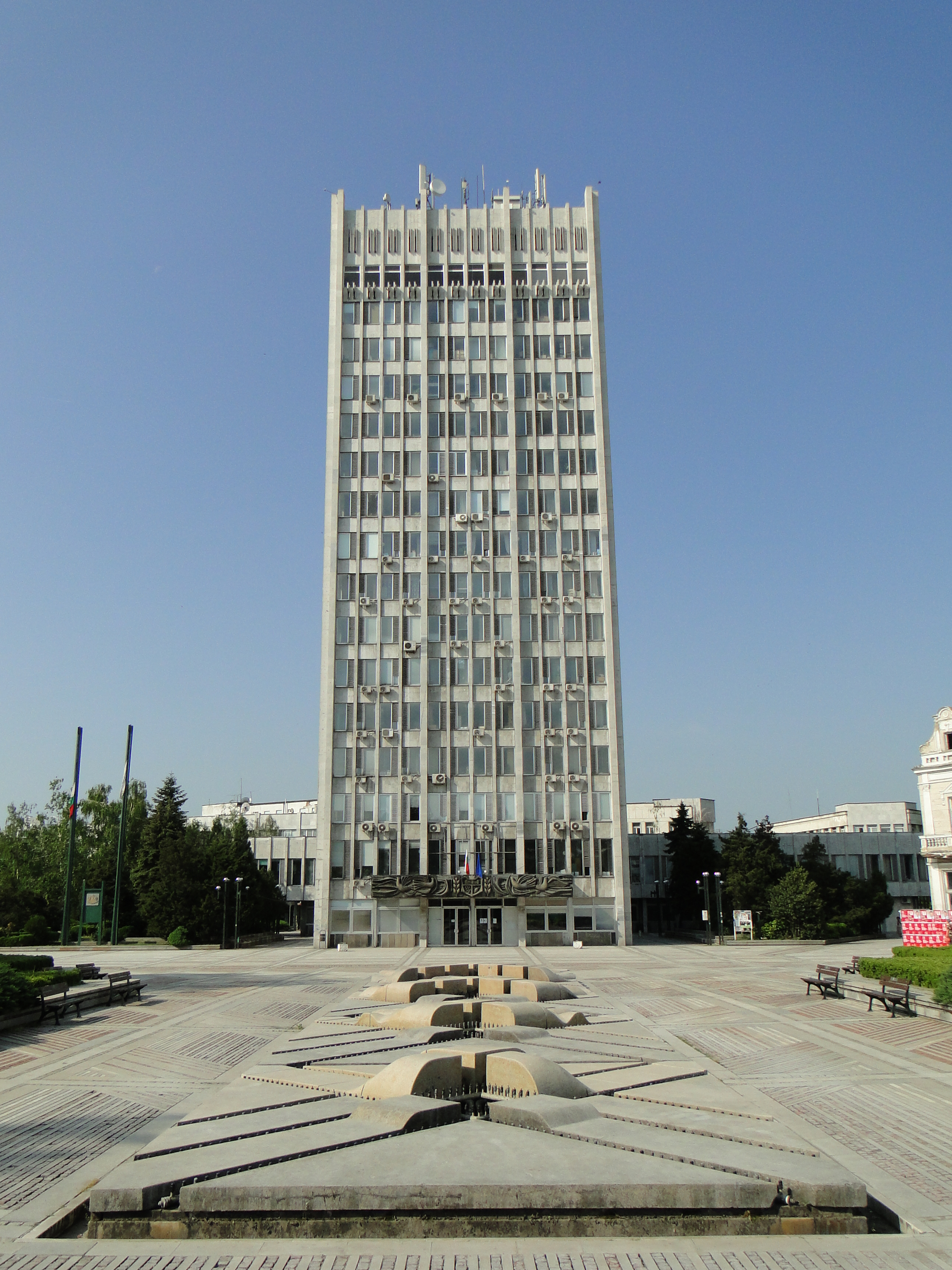 Видин, май 2013